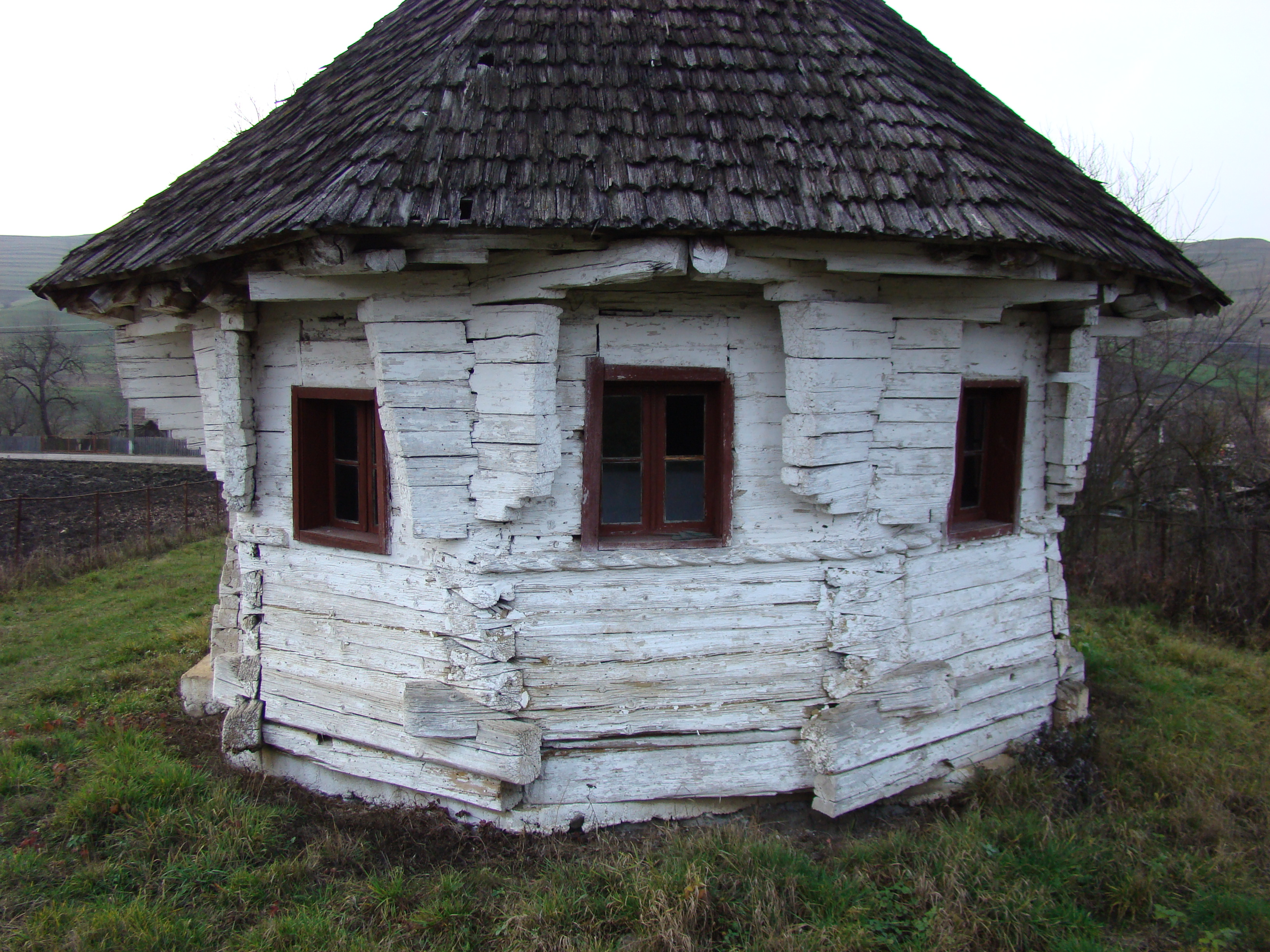 Biserica de lemn „Sf.Arhangheli” din Mădărășeni, județul Mureș